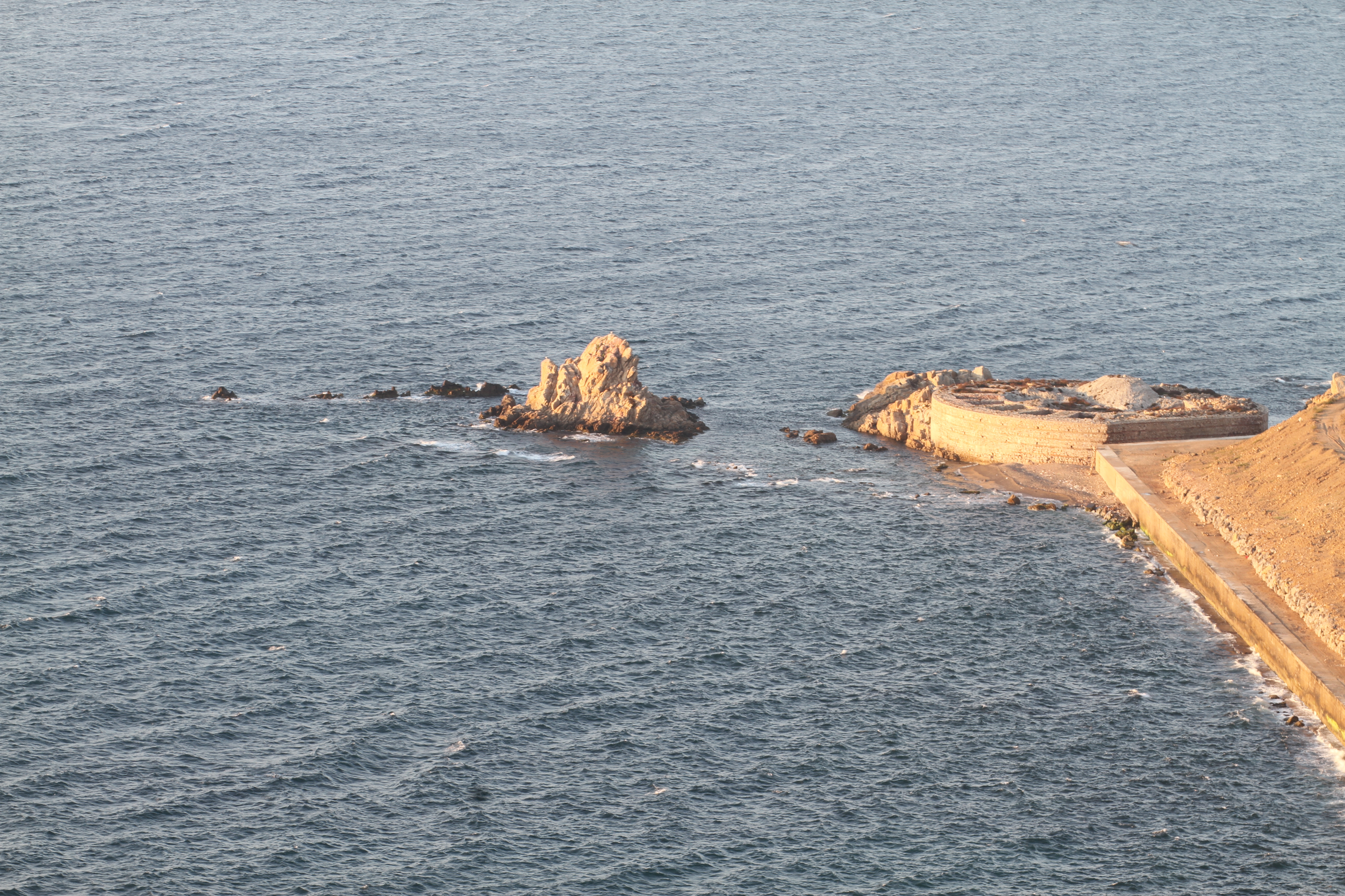 Hileros de marea o isla de santa Cataliana en Ceuta (España)